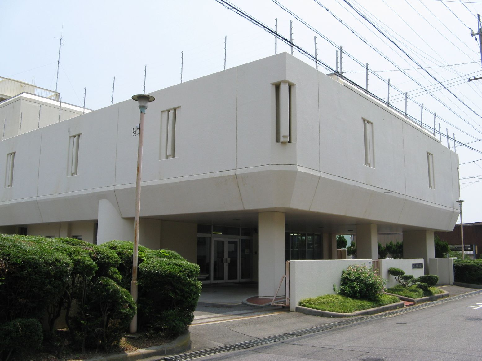 三重刑務所四日市拘置支所